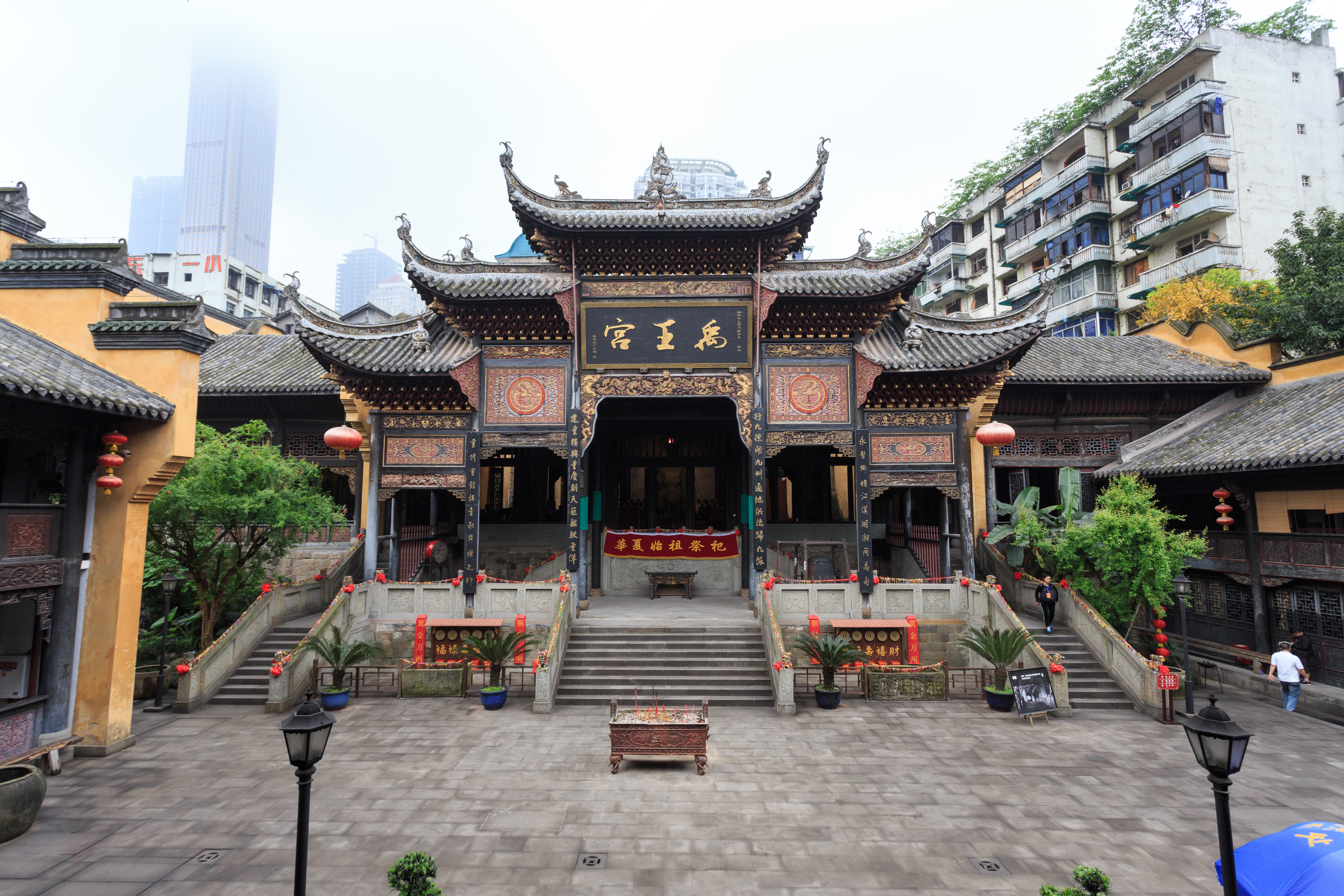 重庆湖广会馆—— 禹王宫